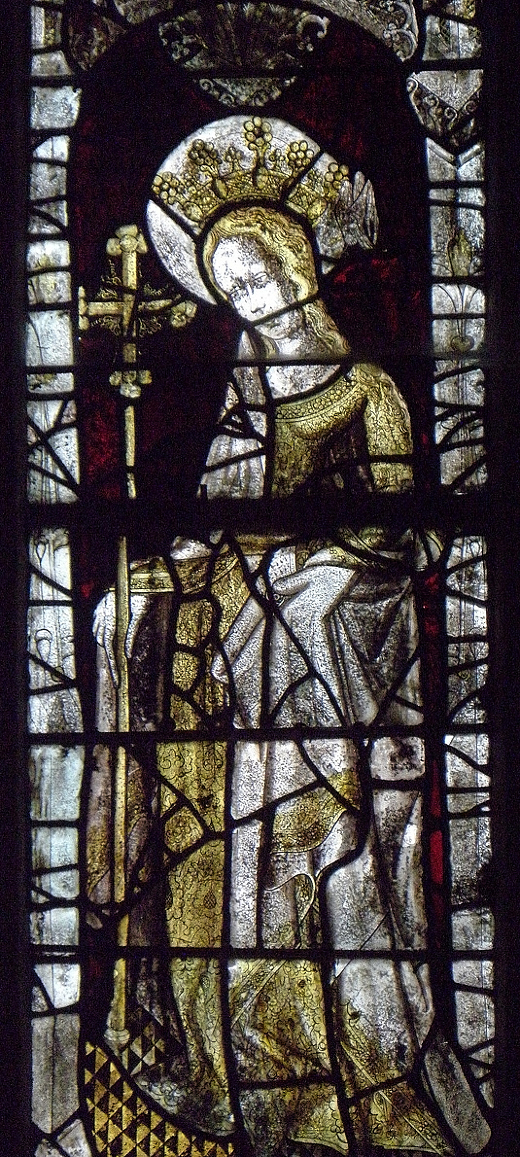 Sainte-Hélène ou Sainte-Marguerite-d'Antioche. Maîtresse-vitre de l'église Notre-Dame de Runan (22).